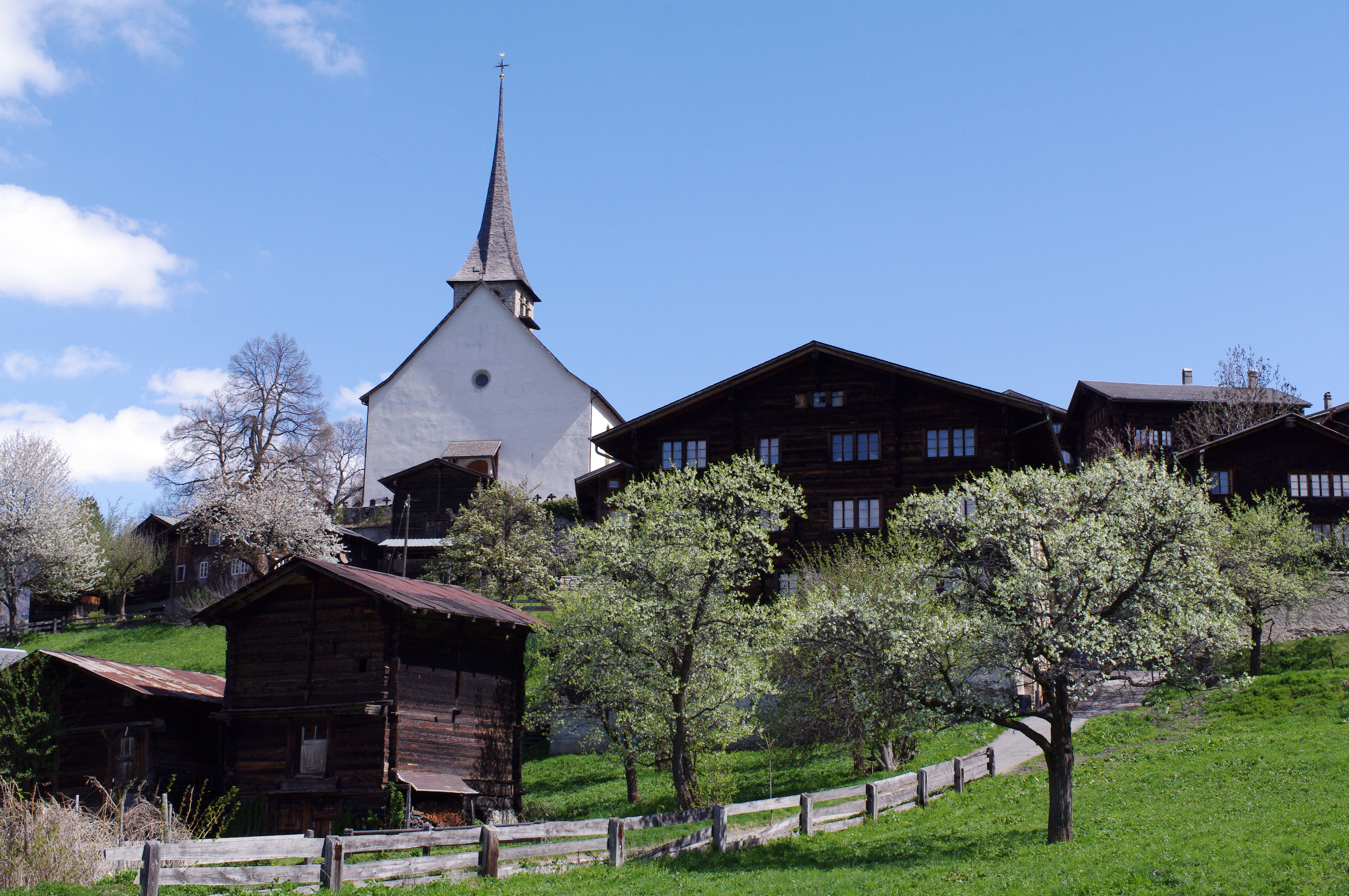 Ort: Ernen im Frühling. Foto: Brigitte Wolf